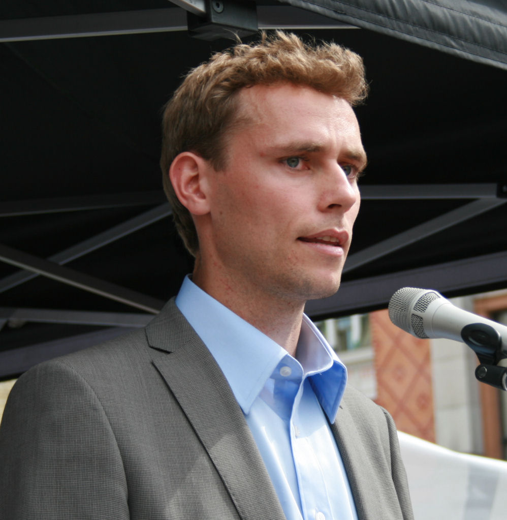 Ola Borten Moe from Sør-Trøndelag